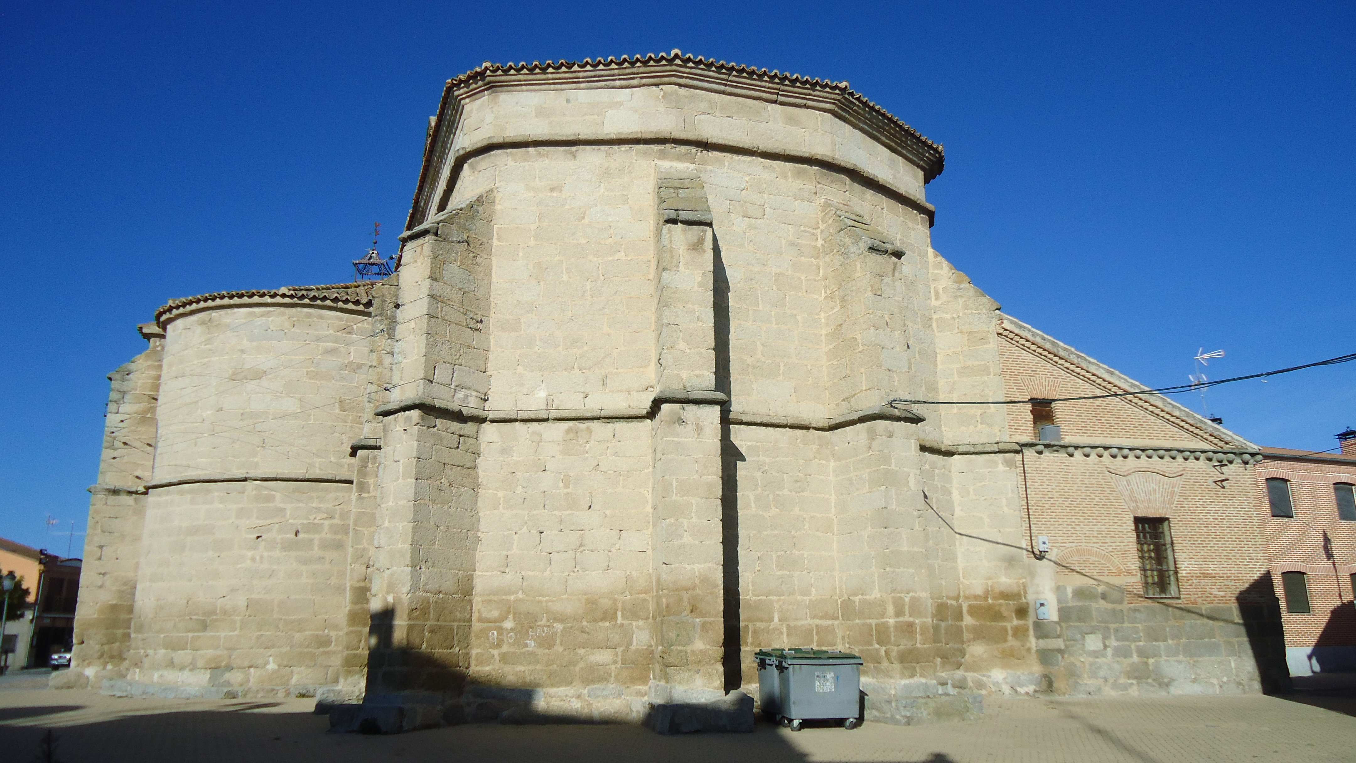 Ábside de la capilla mayor y de la capilla del Rosario de la Iglesia de Nuestra Señora del Castillo, Macotera. A la derecha, la sacristía construida de ladrillo y piedra, donde se puede observar la puerta abierta (hoy cegada) por el ejército francés durante la Guerra de la Independencia.